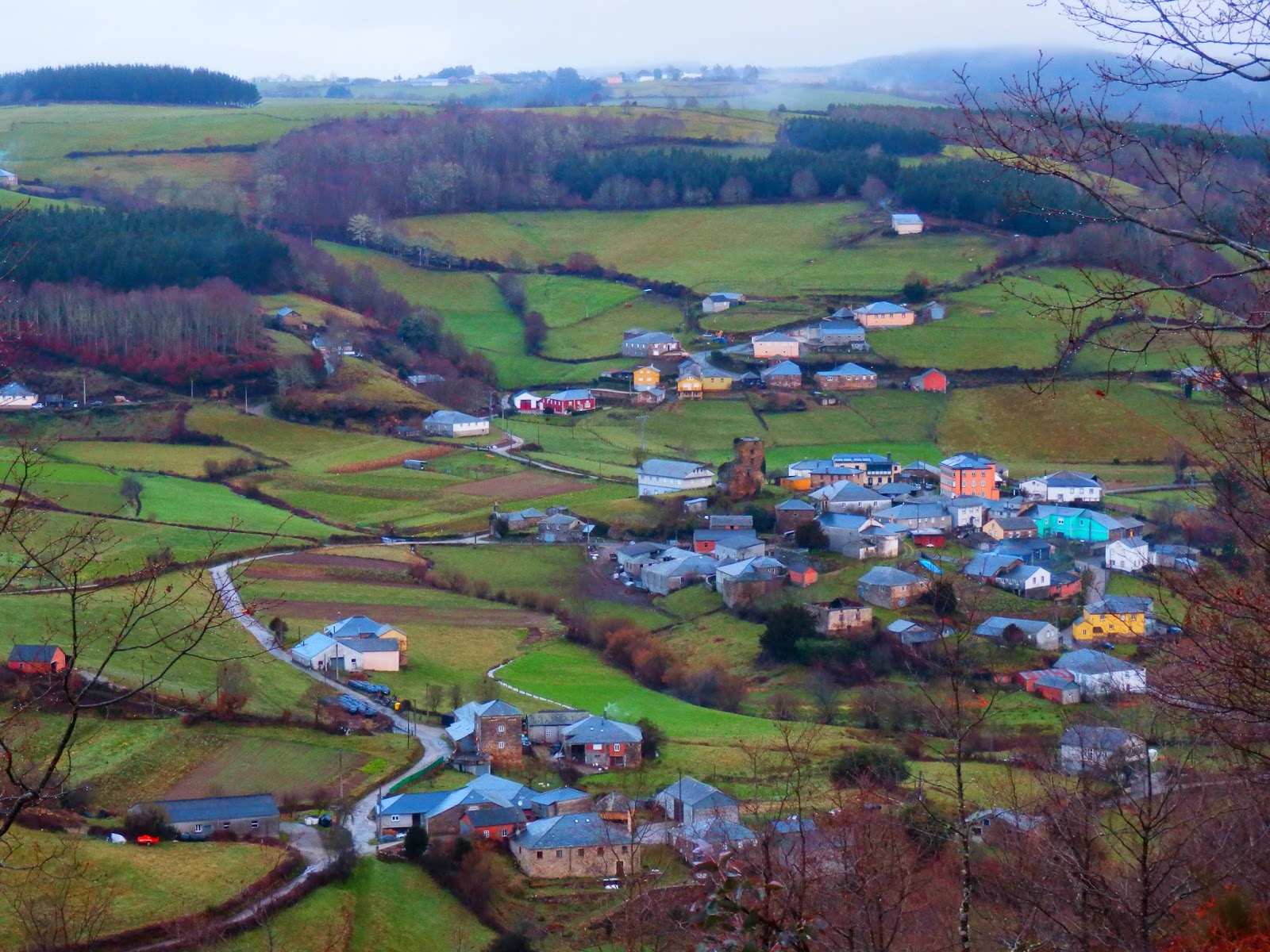 Vista da Proba de Burón, A Fonsagrada.